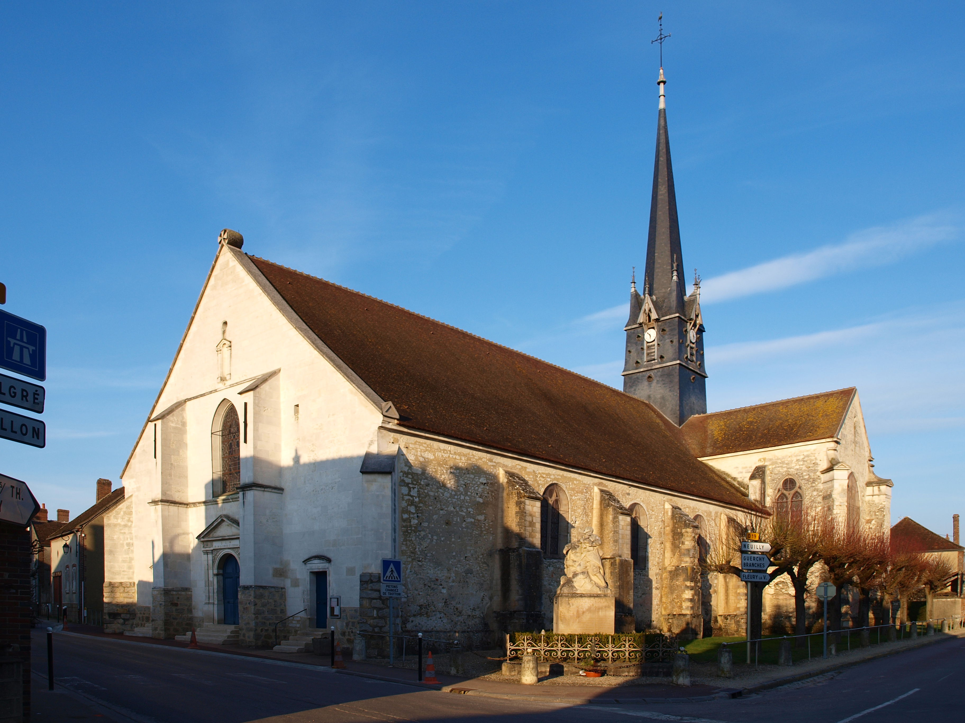 Senan- (Yonne, France) ; l'église Saint-Firmin